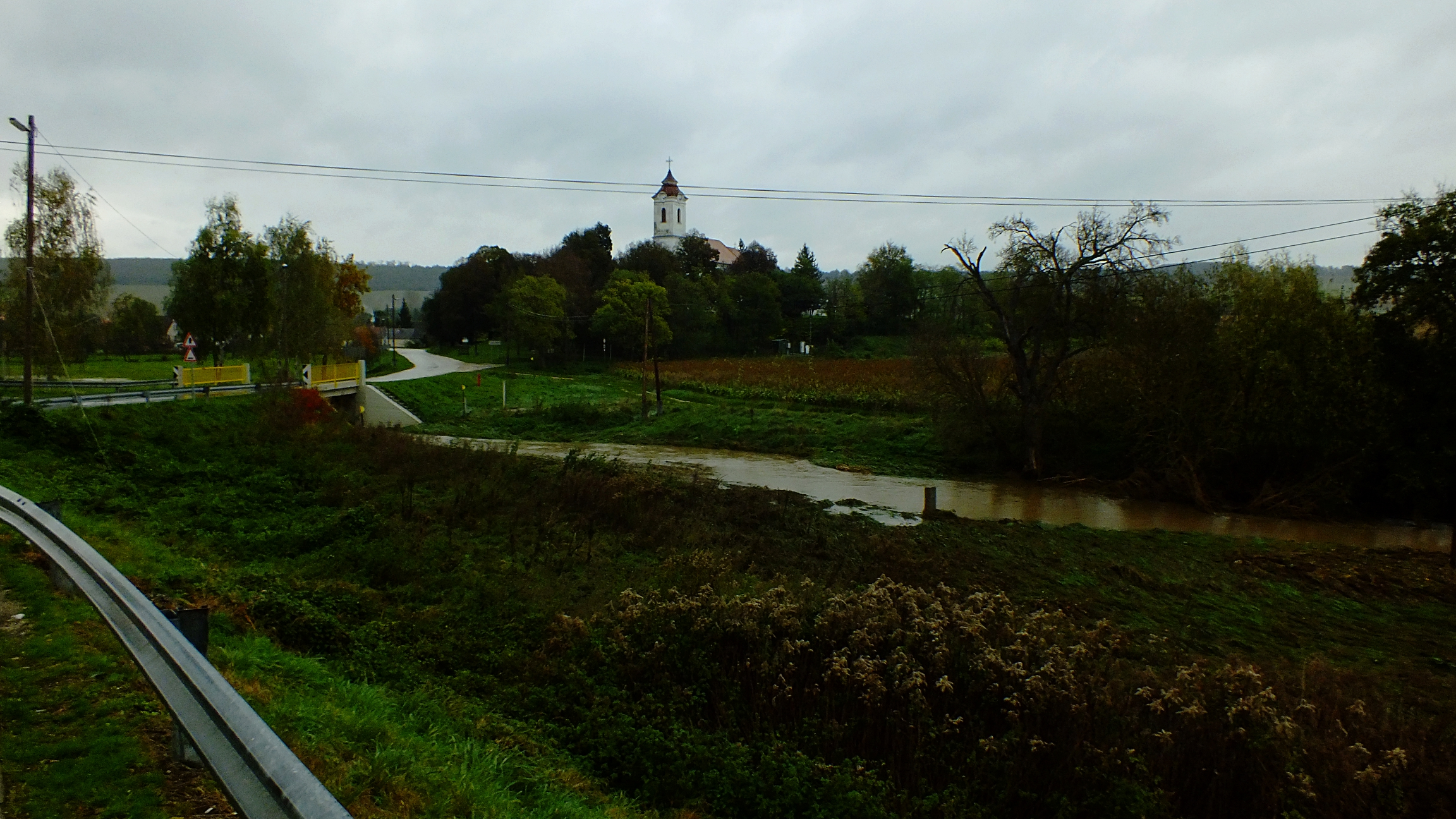 Eger-patak áradása belvízkor, Vigántpetend 2014. október 23.